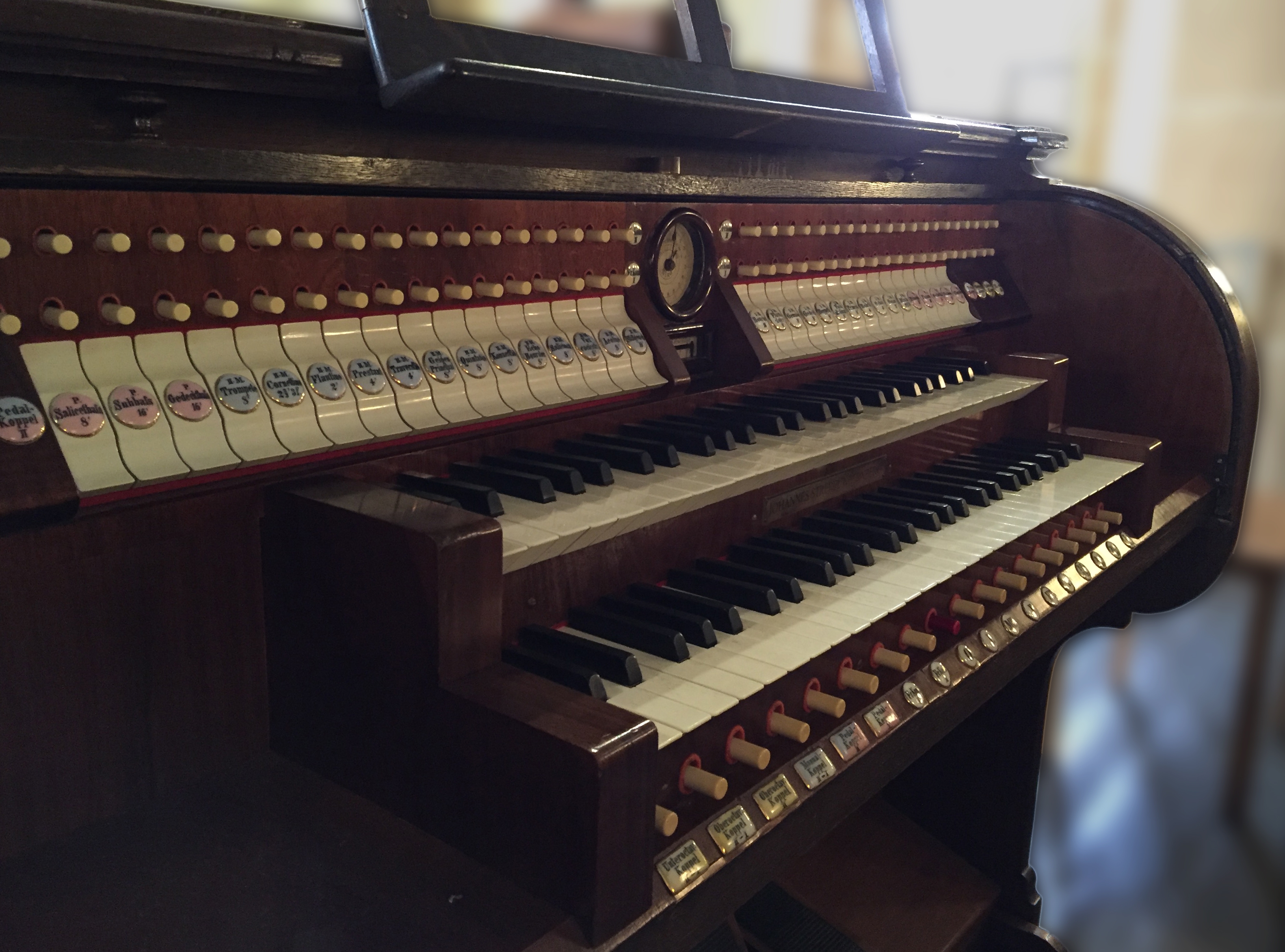 Spieltisch der Strebel-Orgel (Detail) in der Heilig-Kreuz-Kirche, Röthenbach a. d. Pegnitz